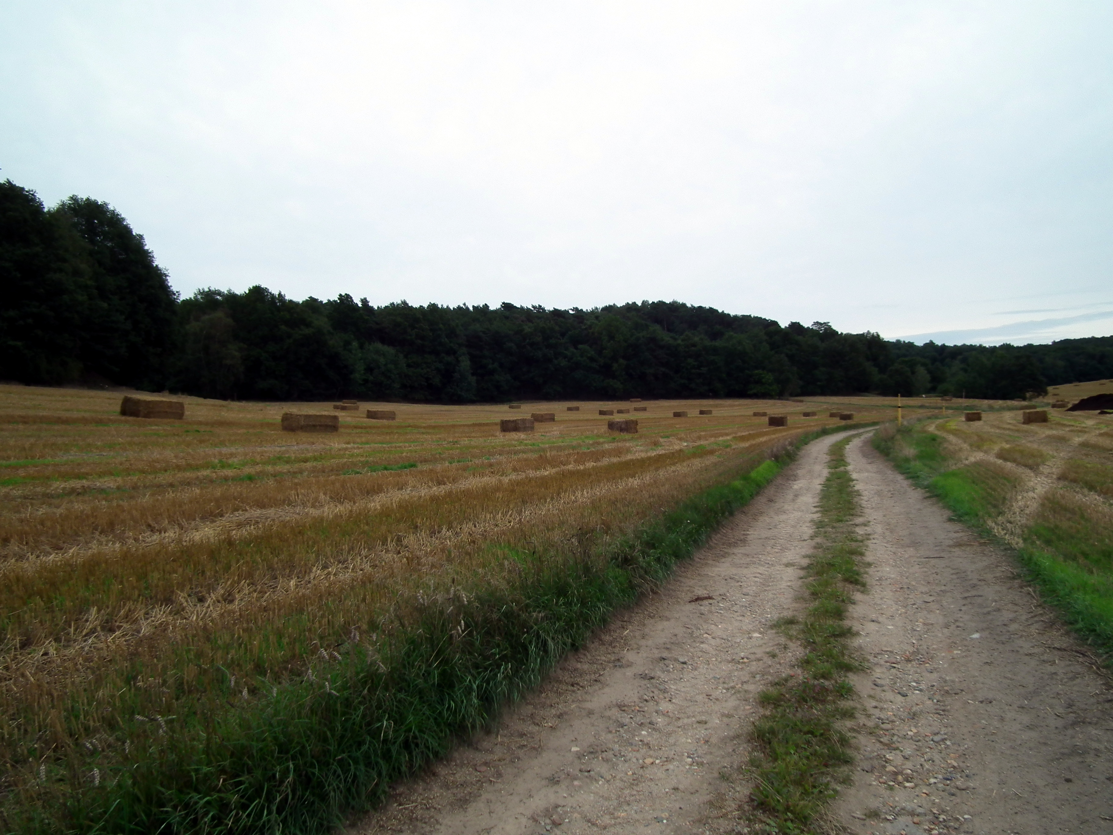 Kutschenberg (Bildmitte) in den Kmehlener Bergen